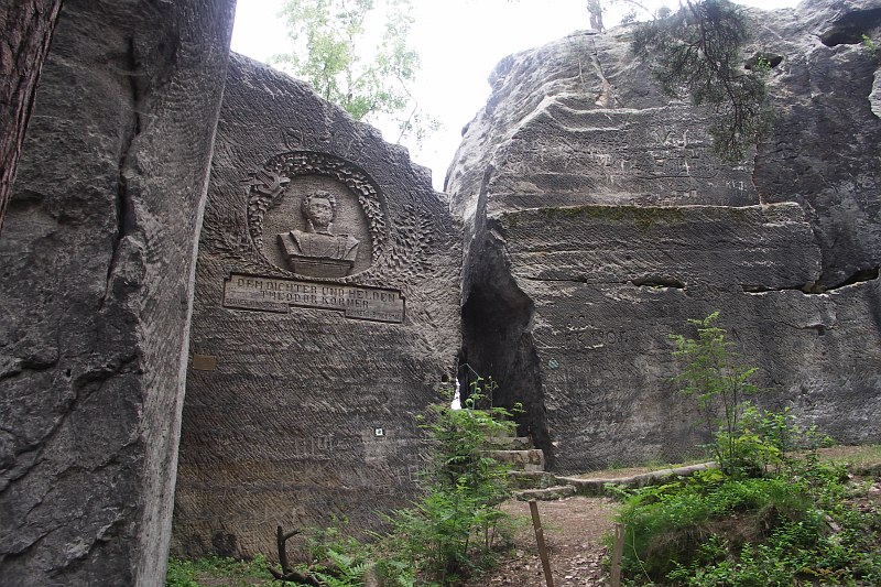 Körner-Relief am Hohlstein, Dutý kámen, Lusatian Mountains, Czech Republic